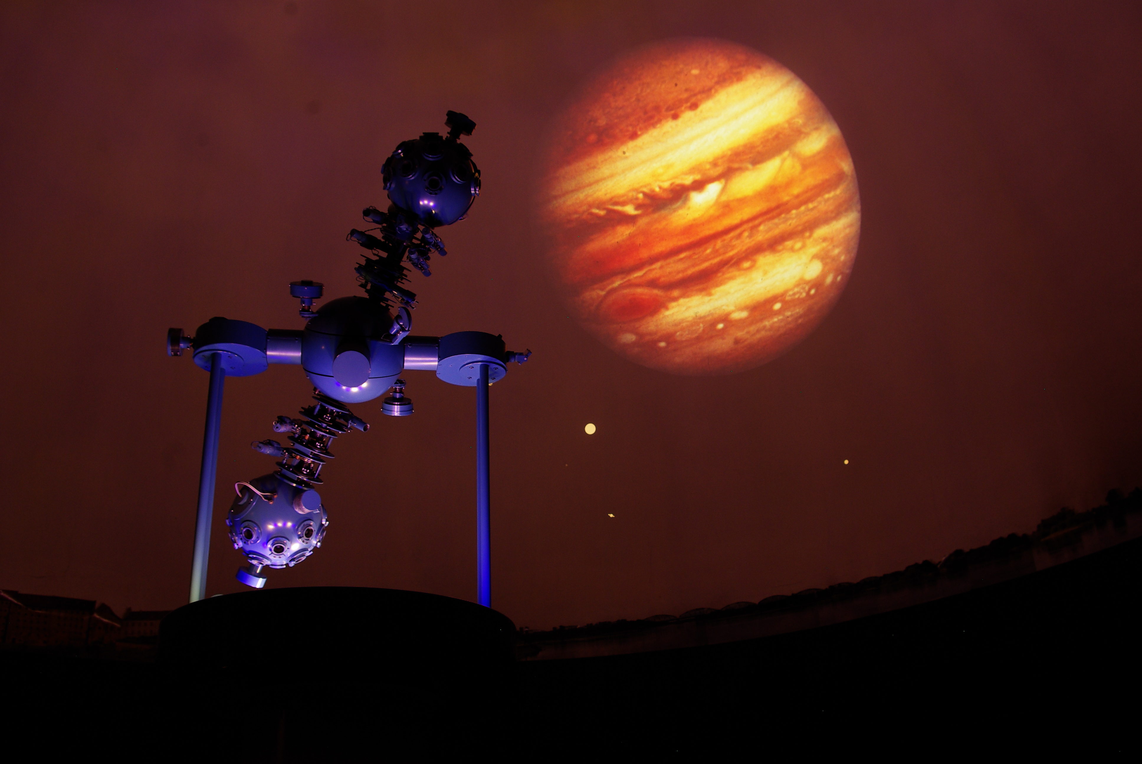 Aparatura będąca na wyposażeniu Planetarium i Obserwatorium Astronomicznego im.Mikołaja Kopernika w Grudziądzu (Polska). Model ZKP2P produkcji Carl Zeiss Jena.